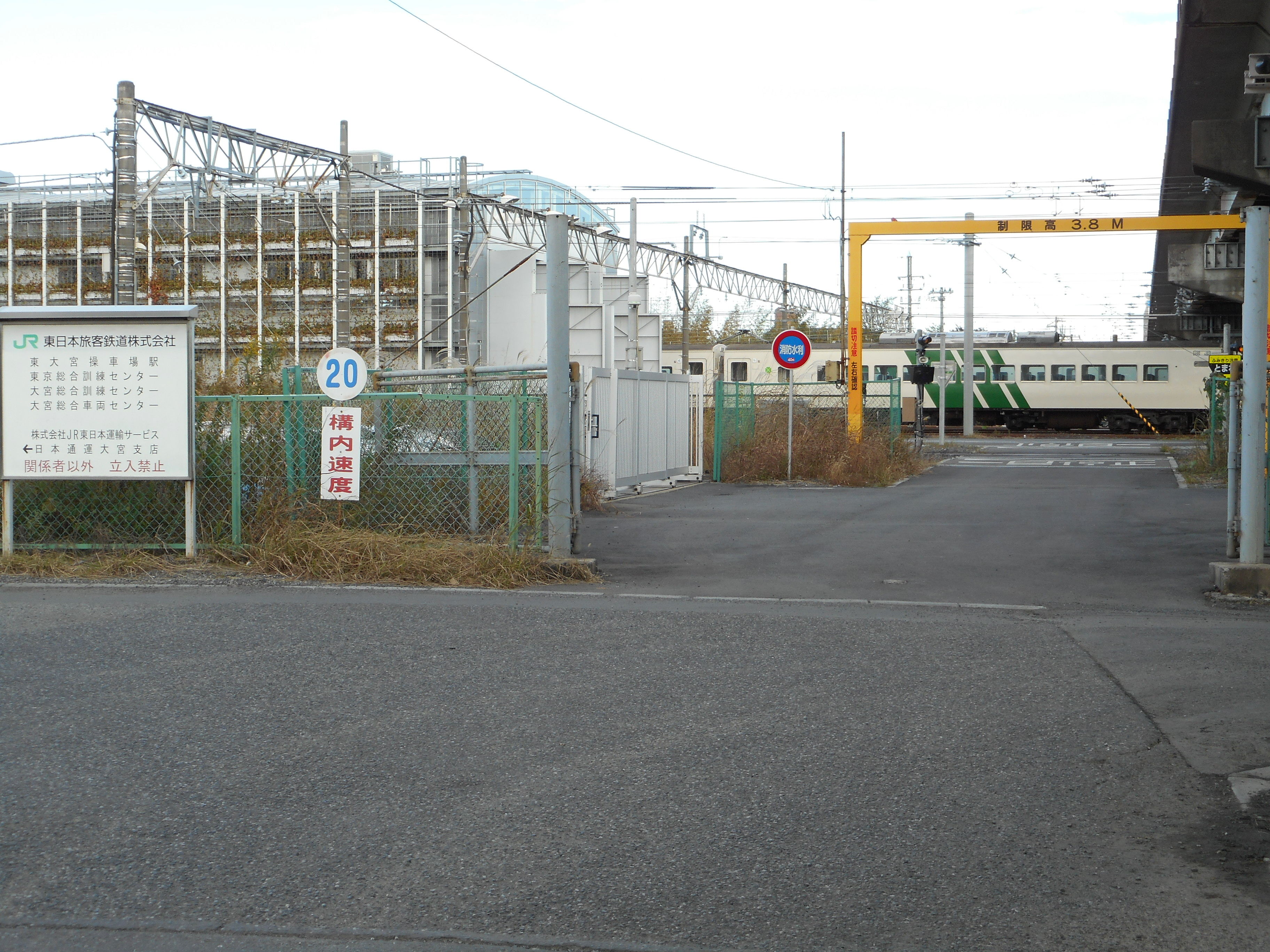 大宮総合車両センター東大宮センター入口（敷地外より撮影）